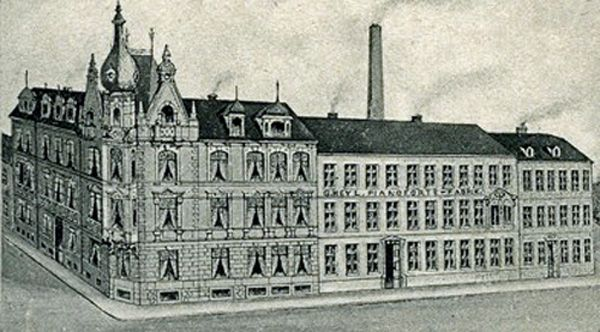 Der Komplex der Klavierbaufirma Heyl in Borna um 1900